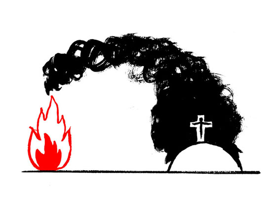 Et mystisk mørke senket seg over Jerusalem da Jesus ble korsfestet. En mulig forklaring på slike mørke dager kan være en skogbrann langt unna.